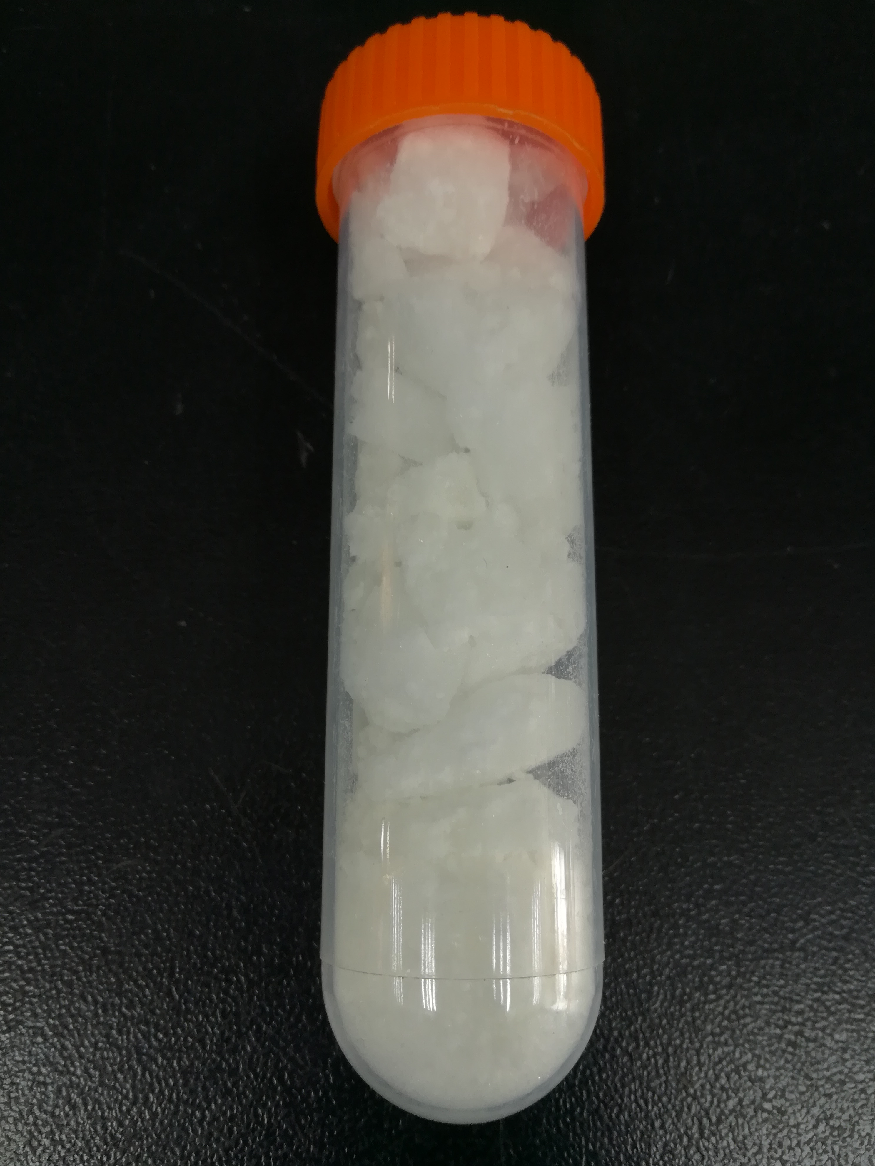 50g硝酸钇